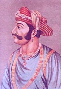 Malhar Rao Holkar, Maharaja of Indore